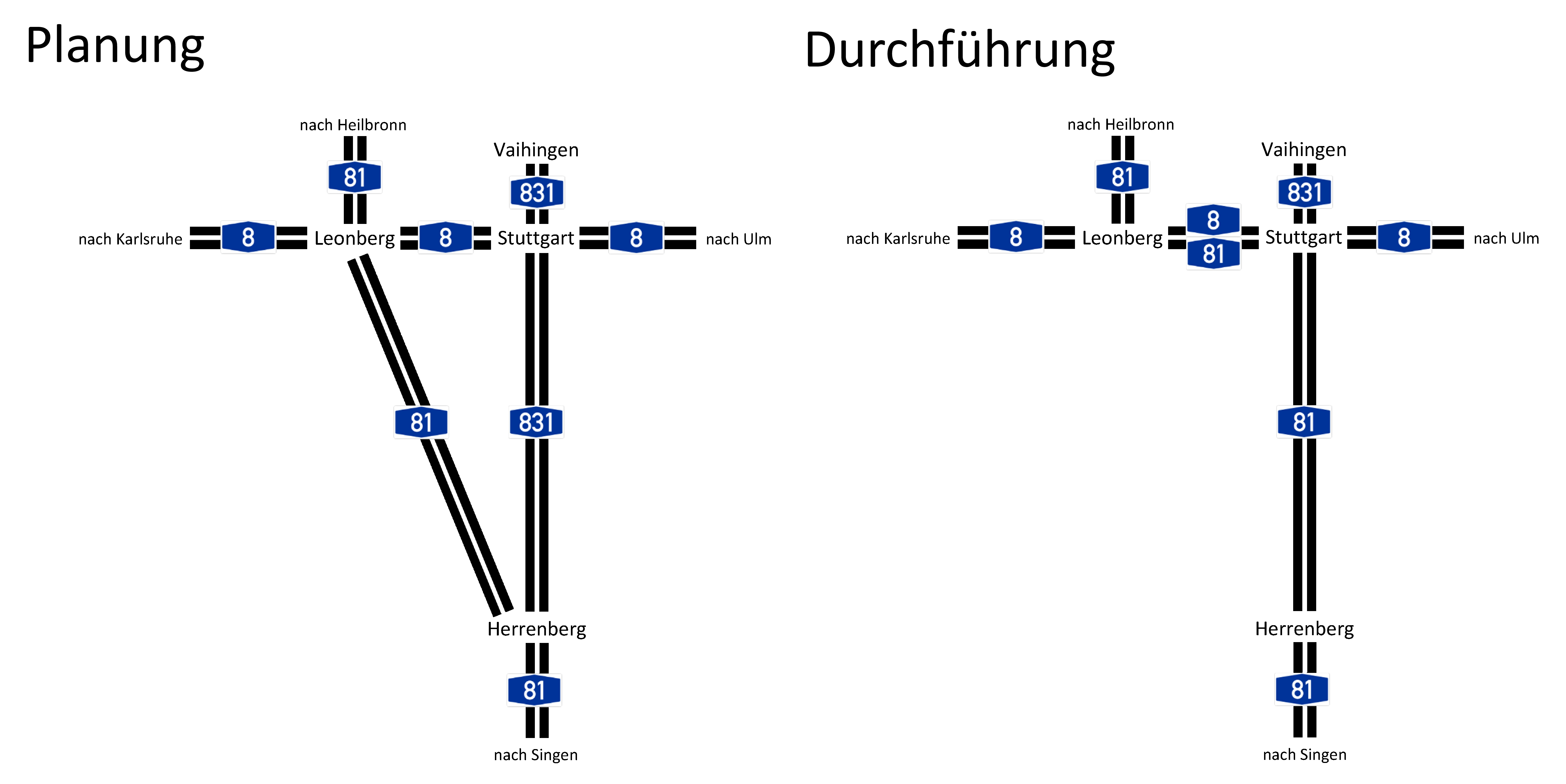 Vergleich des geplanten Streckennetzes von A8, A81 und A831 mit der letztendlichen Durchführung